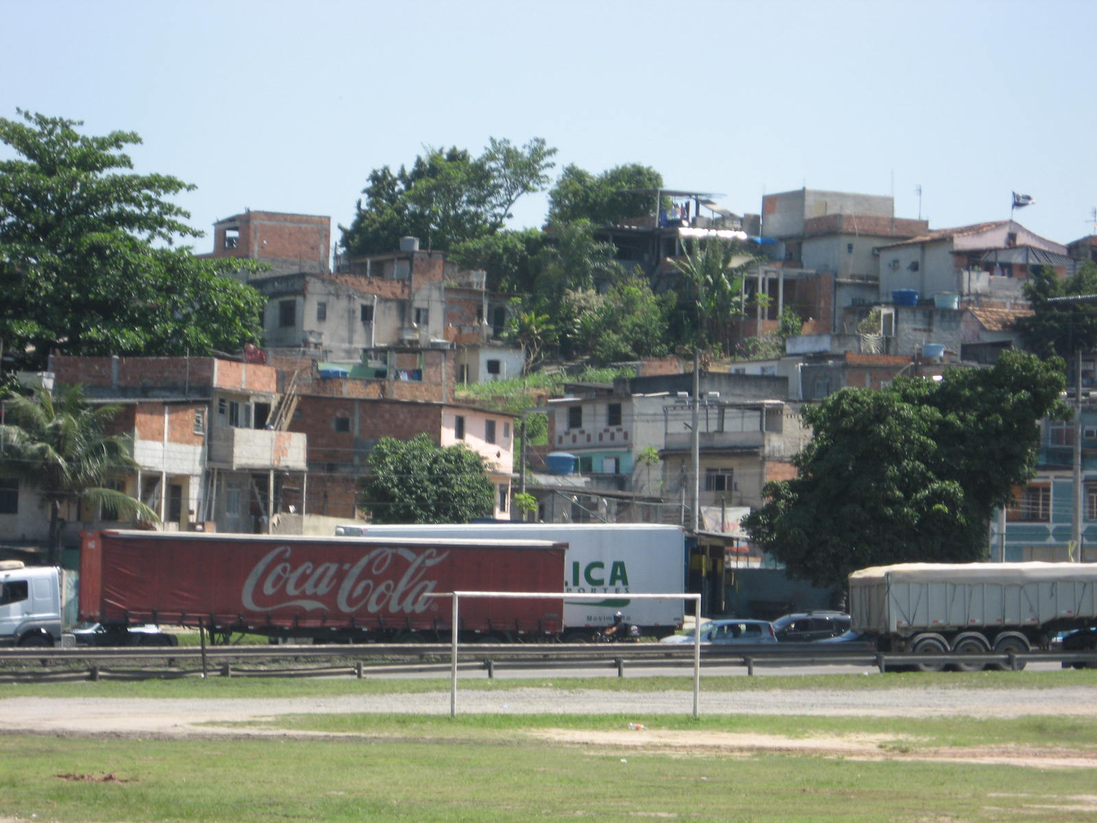 Cidade Alta, no Rio de Janeiro.